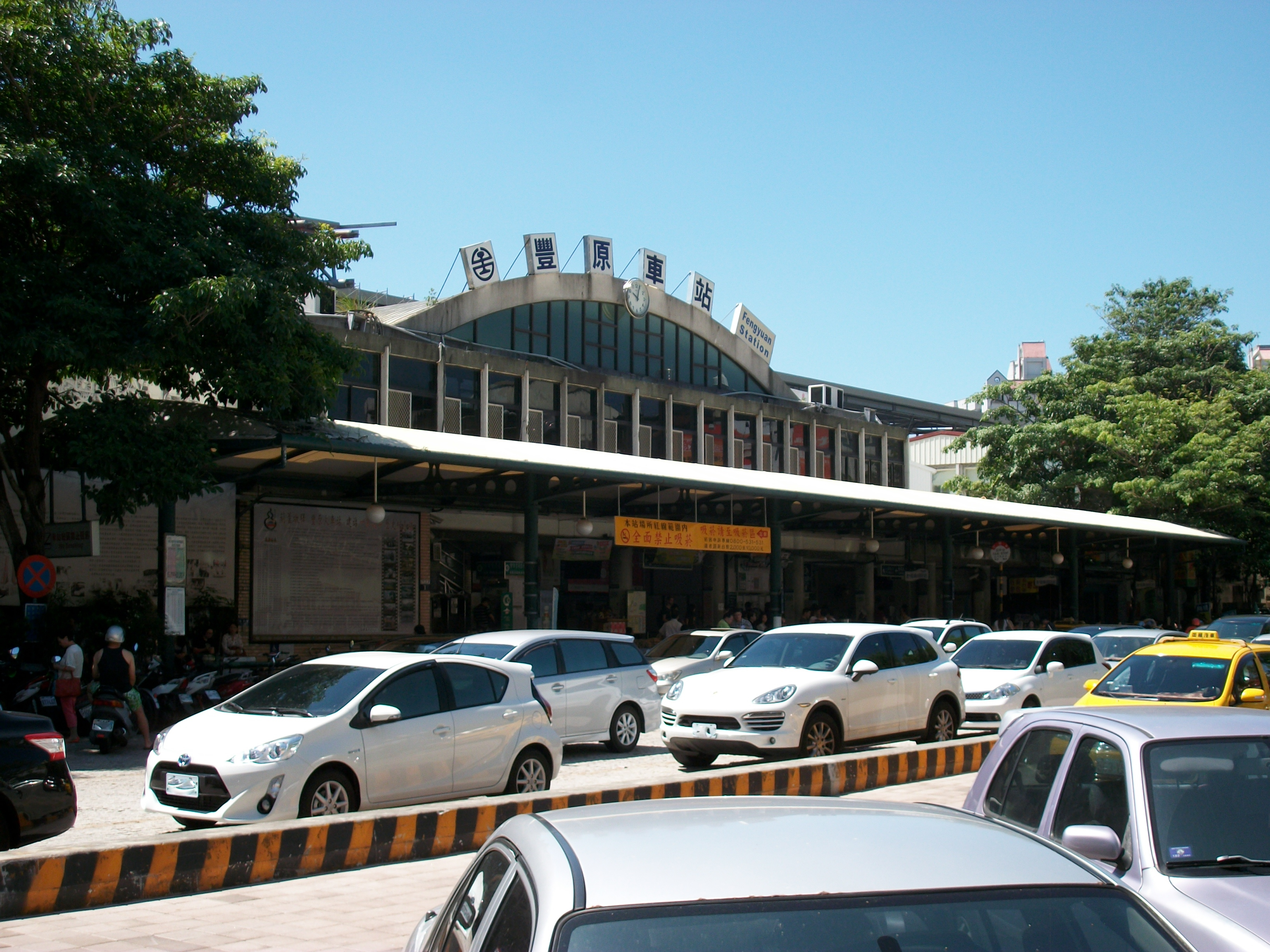 豐原車站為臺灣鐵路臺中線主要車站之一，目前為一等站。